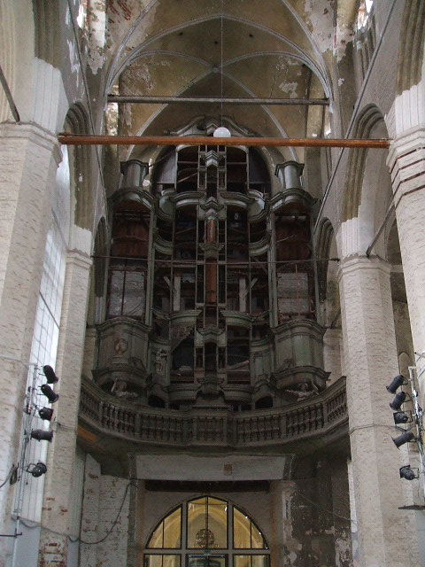 Kulturkirche St. Jakobi in Stralsund, Deutschland.